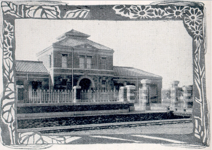 中文（台灣）: 苗栗廳廳舍